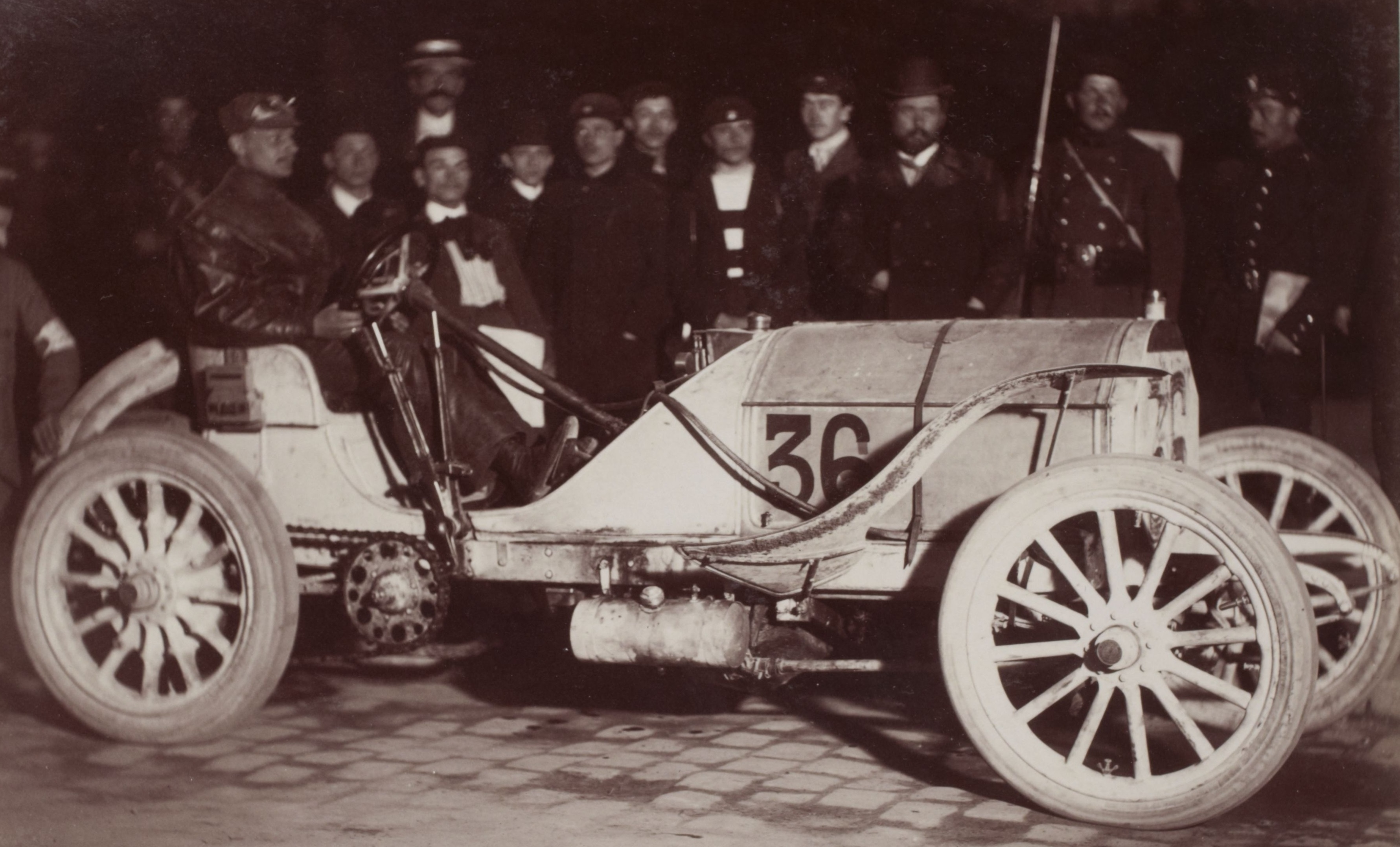 [Collection Jules Beau. Photographie sportive] : T. 21. Année 1903 / Jules Beau : F. 36v. [Paris - Madrid], Versailles, 24 mai 1903